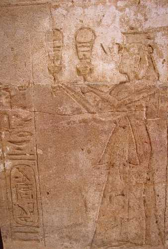 Pharaoh Tausert at Amada Temple, Nubia